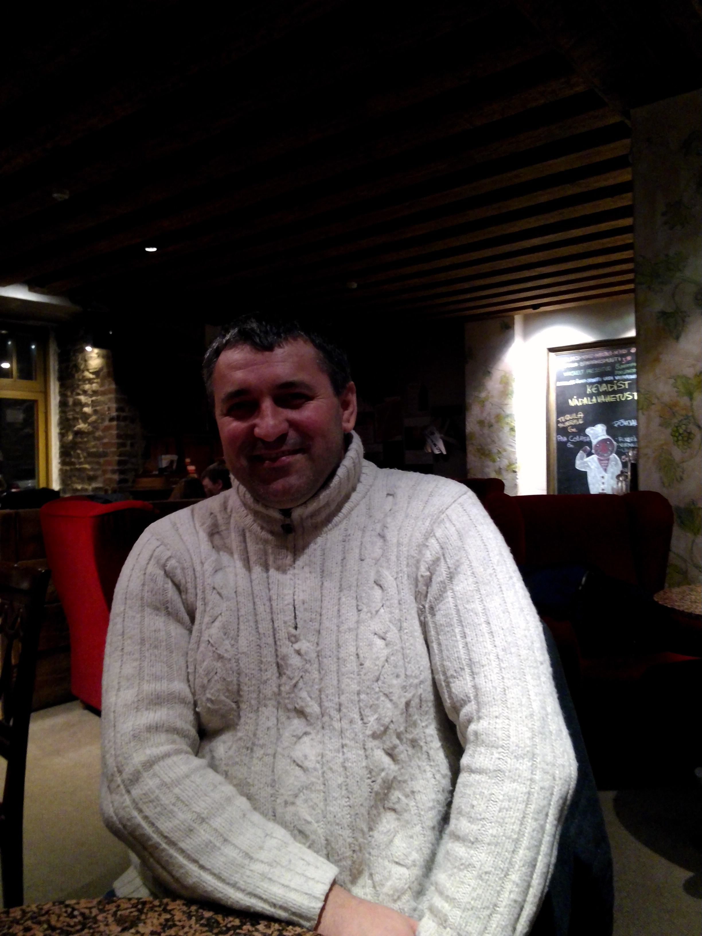 Володимир Паламар - президент Асоціації українських організацій в Естонії